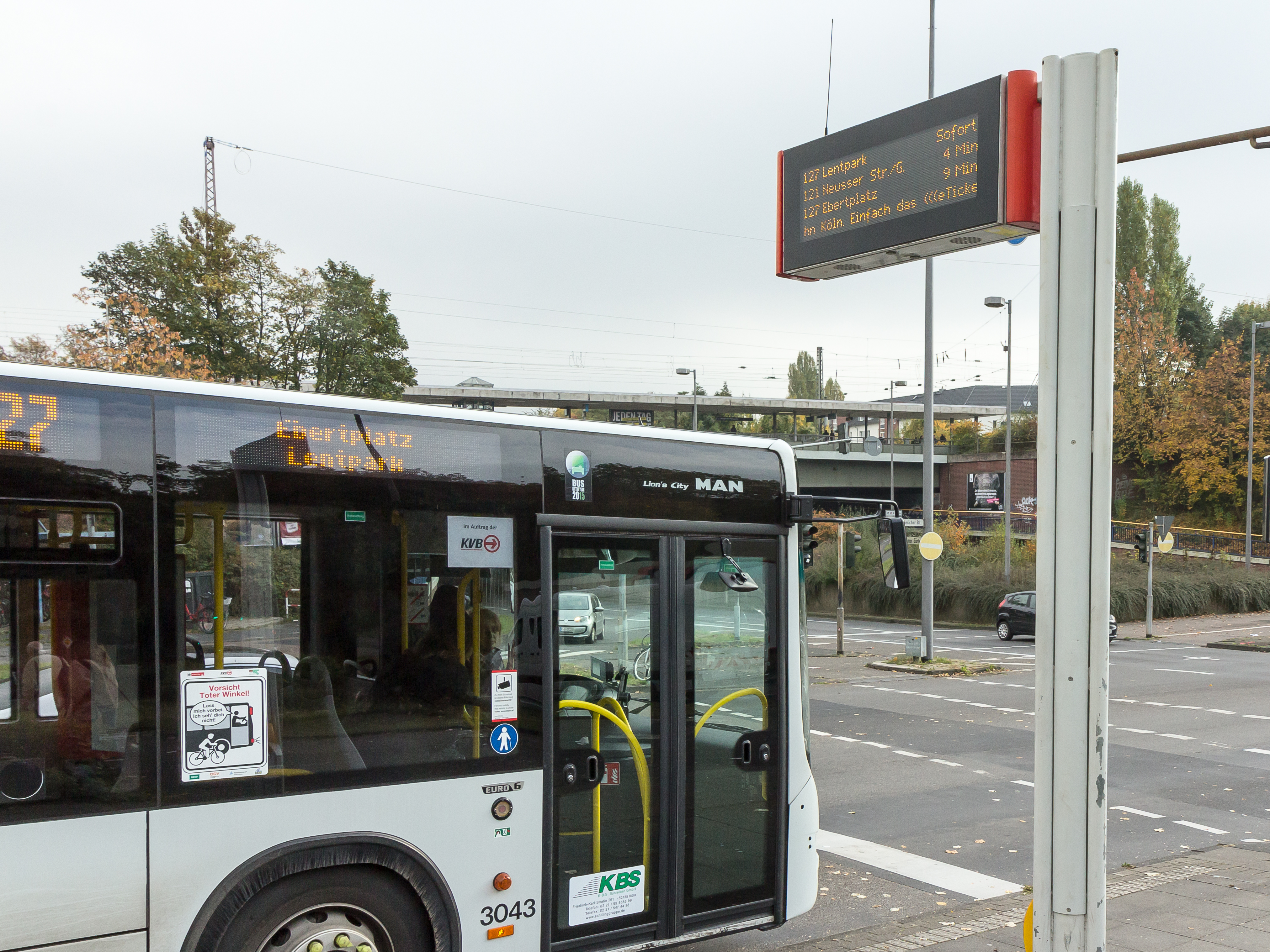 Dynamische Fahrgastinformations-Anzeige (MOFIS) an der Bushaltestelle Geldernstraße/Parkgürtel